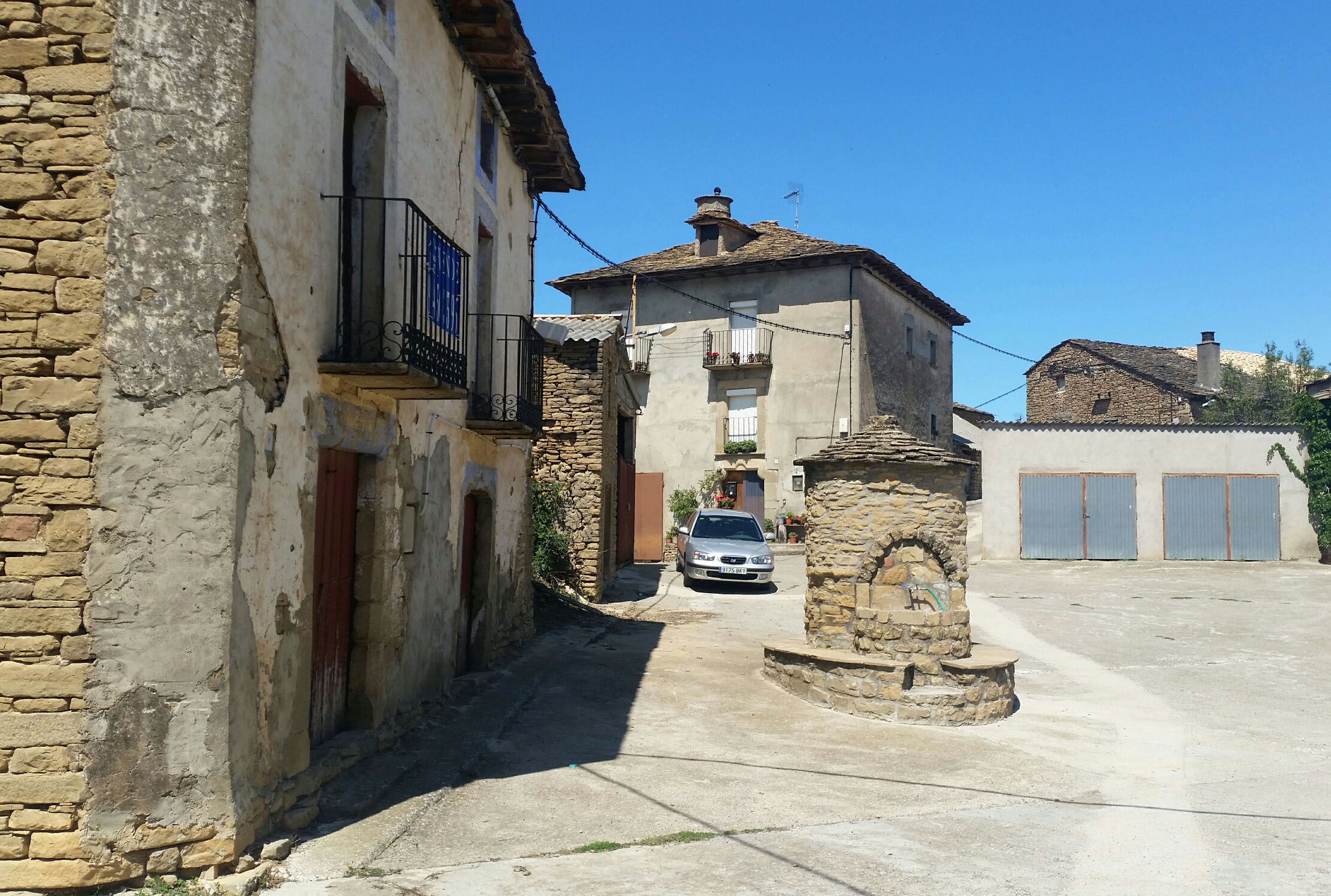 Pueblo de Alastuey, Jacetania, Aragón, España